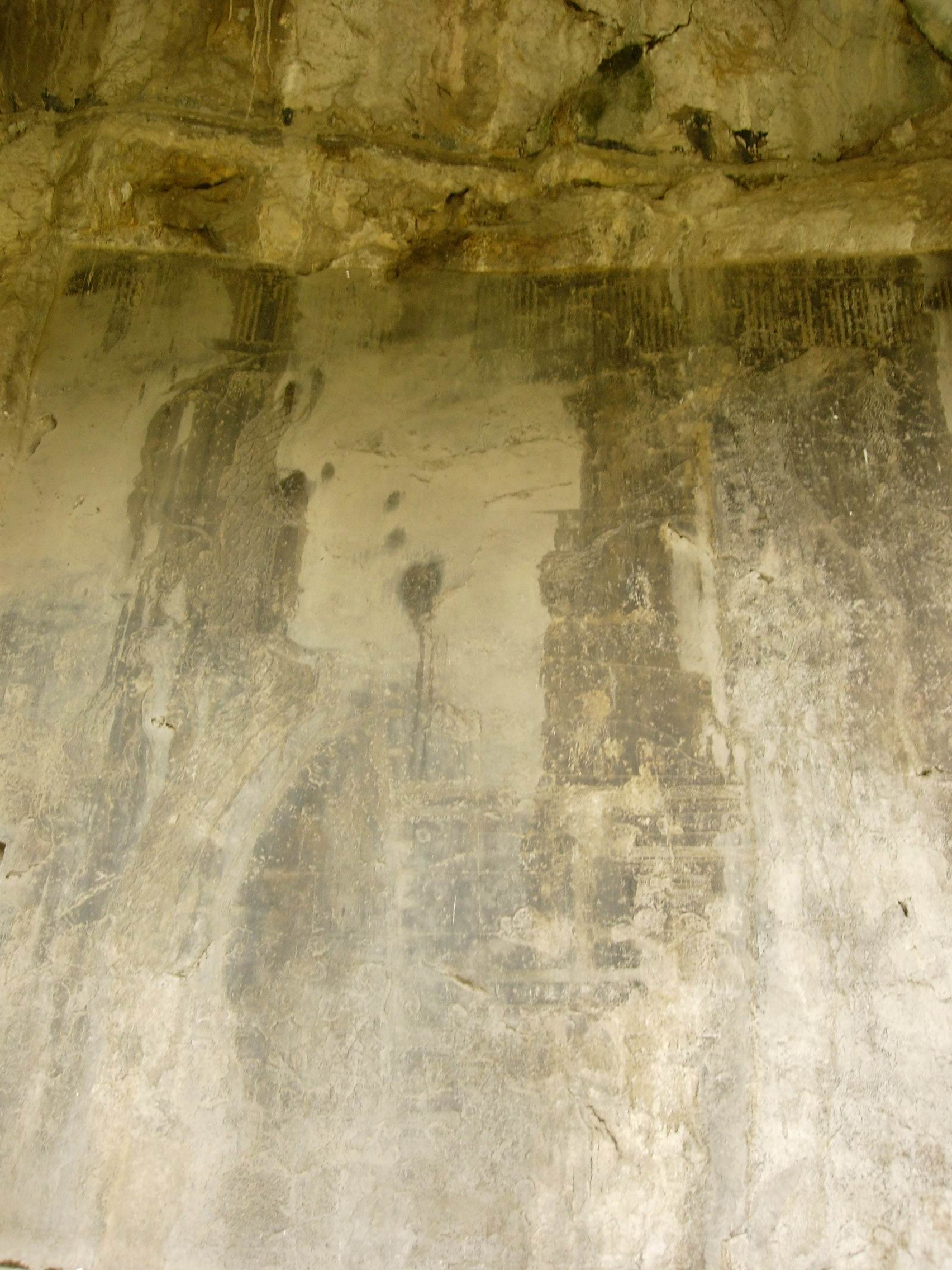 桂林鹦鹉山《静江府城池图》